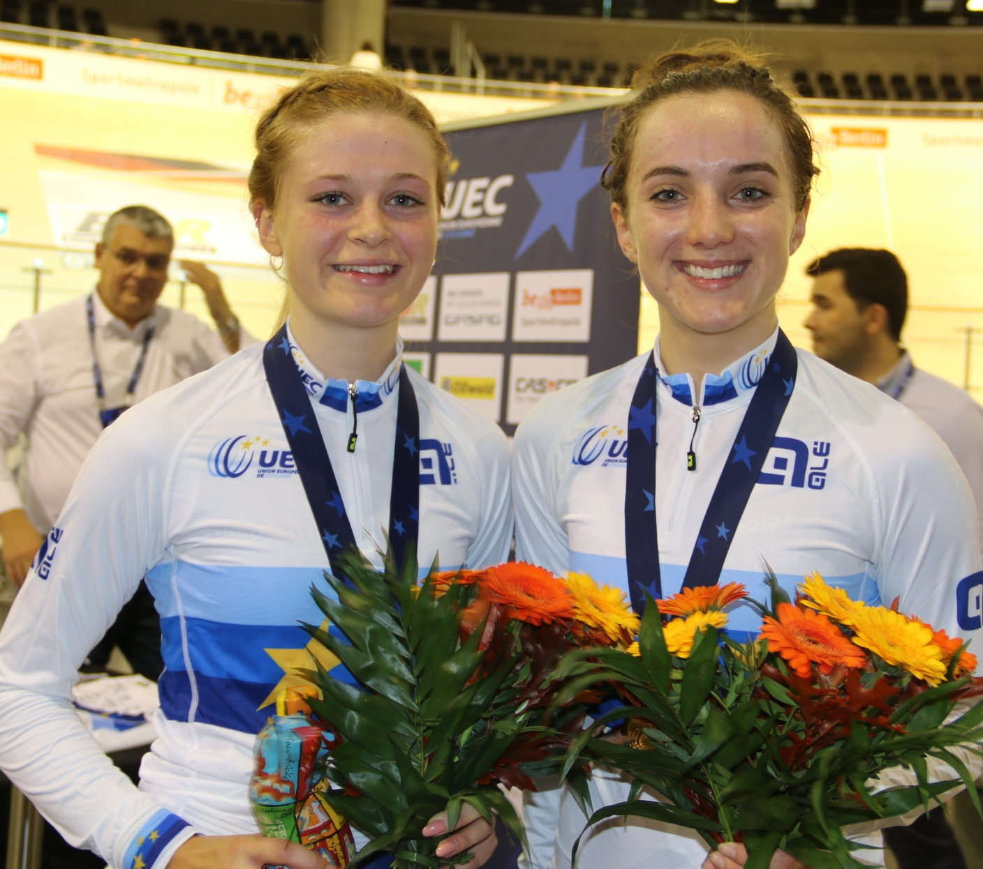 Eleanor Dickinson (l.) und Elinor Barker, Goldmedaille im Zweier-Mannschaftsfahren